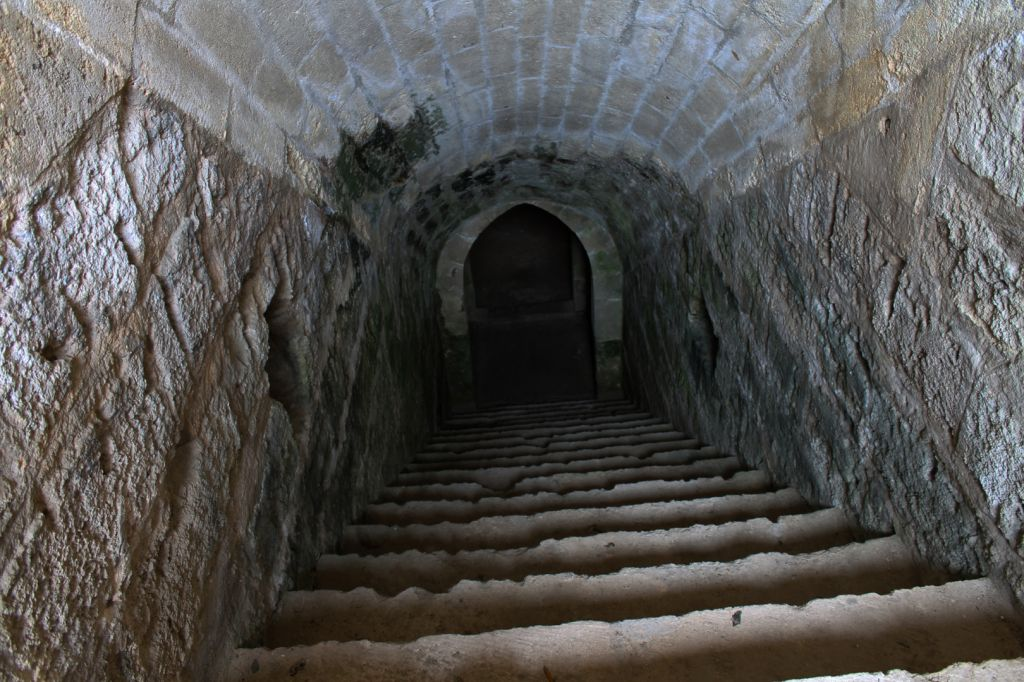 Poco distante dal centro abitato possiamo ammirare i ruderi del castellaccio( castrum vetus), costruito seguendo il disegno della sommità piatta della rupe su cui poggia. Le prime informazioni riguardanti il castello medievale risalgono all'epoca normanna.